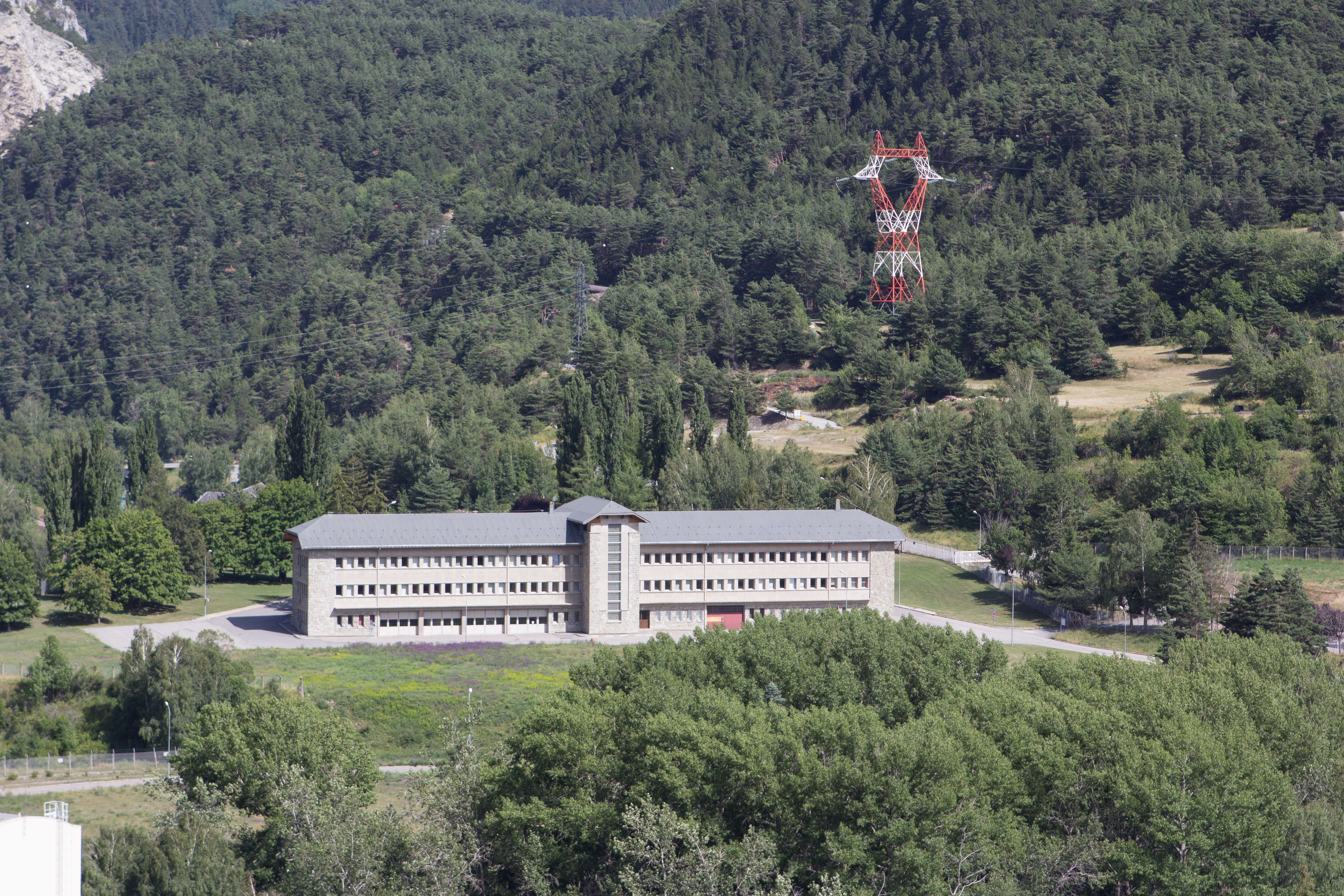 L'Office national d'études et de recherches aérospatiales (ONERA) à Avrieux (Savoie - France)